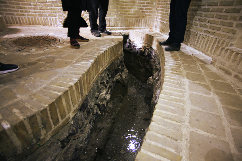 مشاهده مسیر بالایی قنات و درب ورودی مسیر پایینی